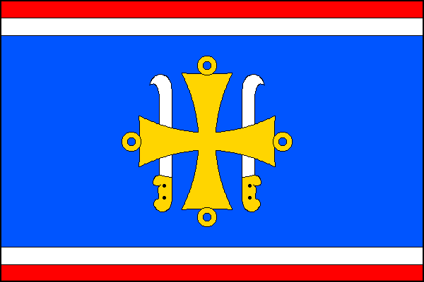 List tvoří pět vodorovných pruhů červený, bílý, modrý, bílý a červený, v poměru 1:1:12:1:1. Uprostřed žlutý tlapatý kříž s kroužky na koncích ramen, podložený svisle dvěma odvrácenými bílými vinařskými noži se žlutými rukojeťmi. Poměr šířky k délce listu je 2:3.